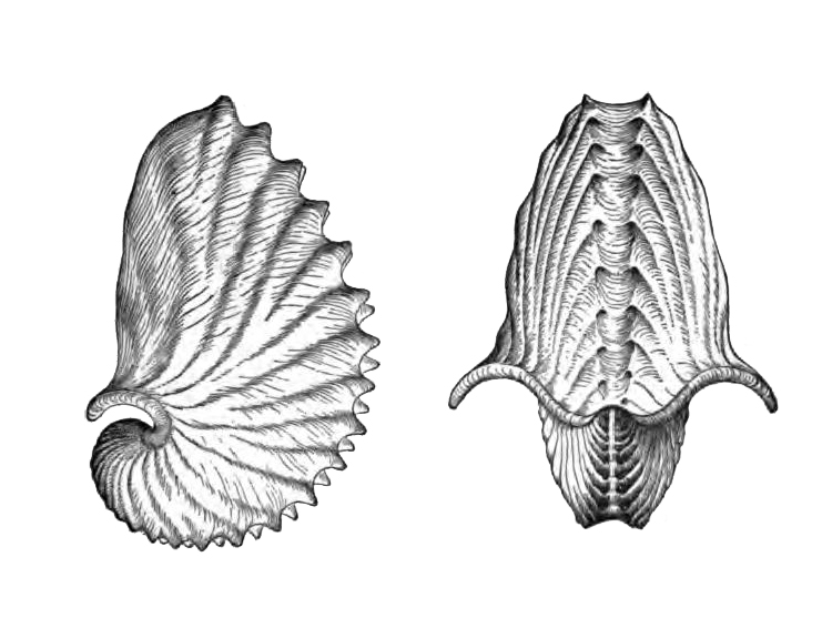 Argonauta argo